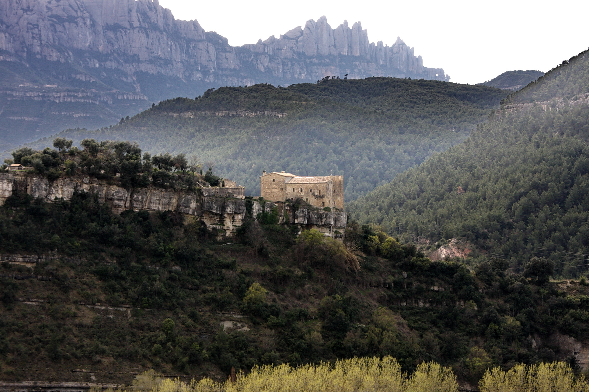 Castell de Castellbell (Castellbell i el Vilar) amb Montserrat al fons